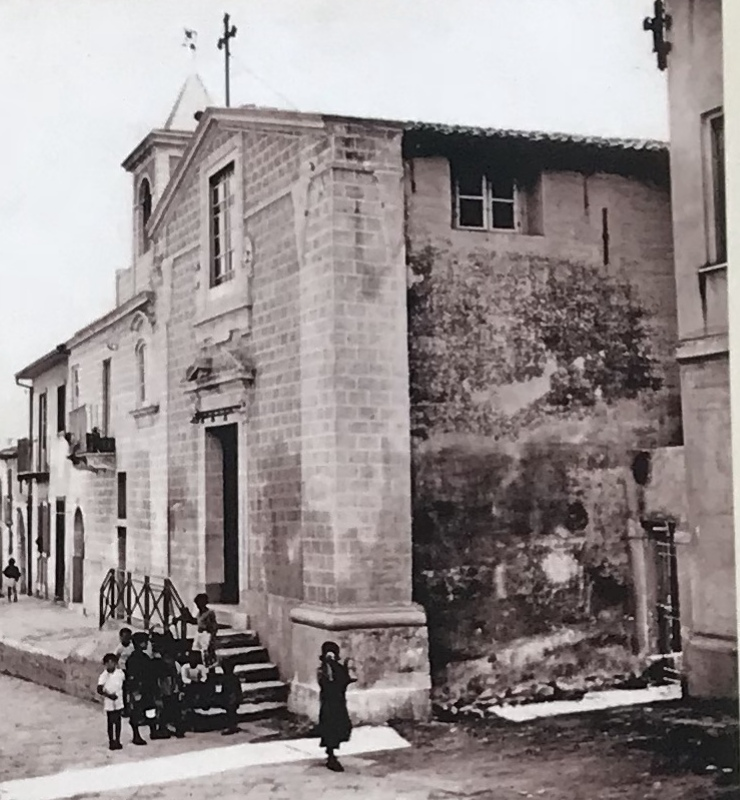 Santa Rita, Messina